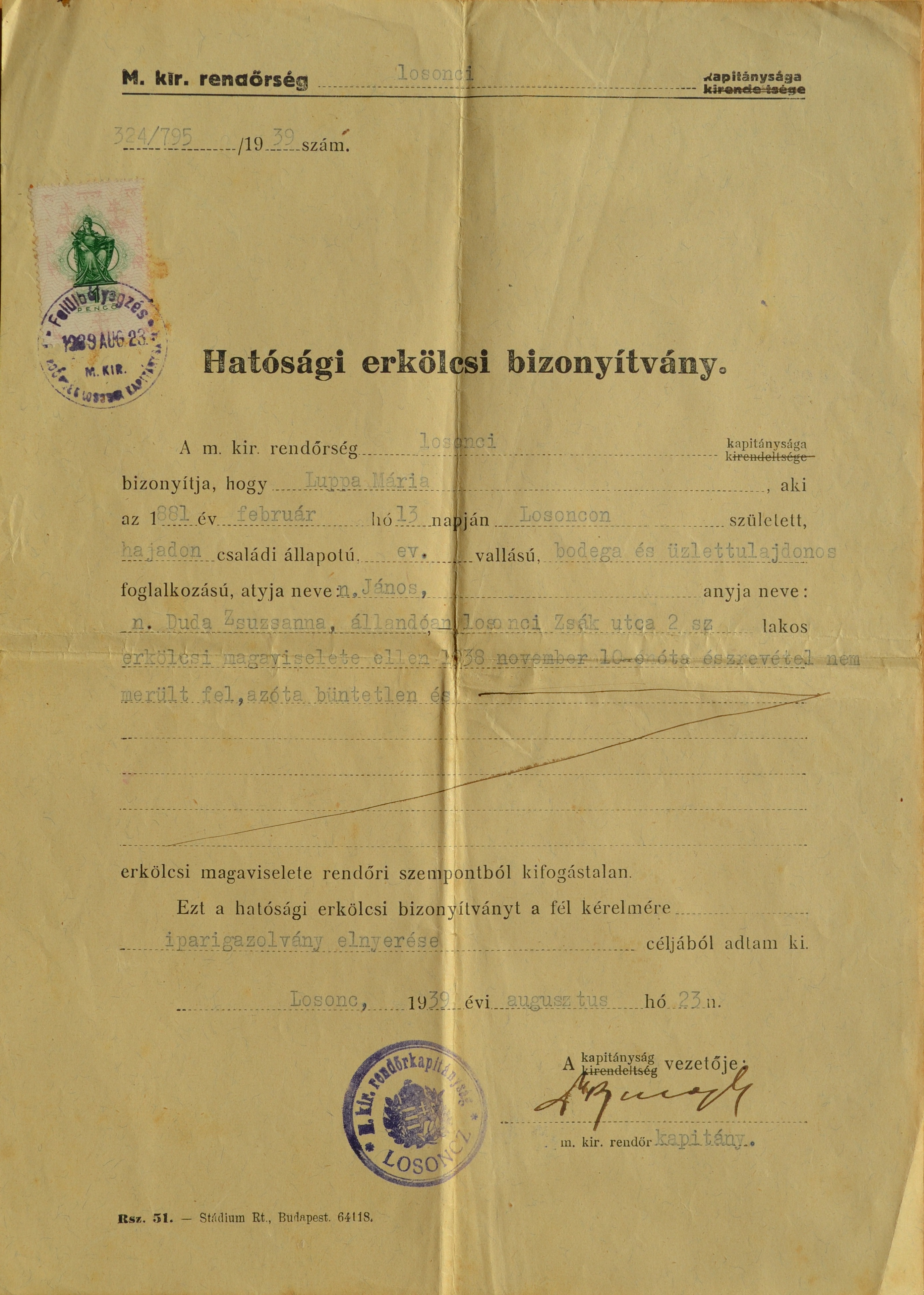 Losonc, hatósági erkölcsi bizonyítvány, kiadott iparigazolvány elnyerése céljábol, 23. augustus 1939